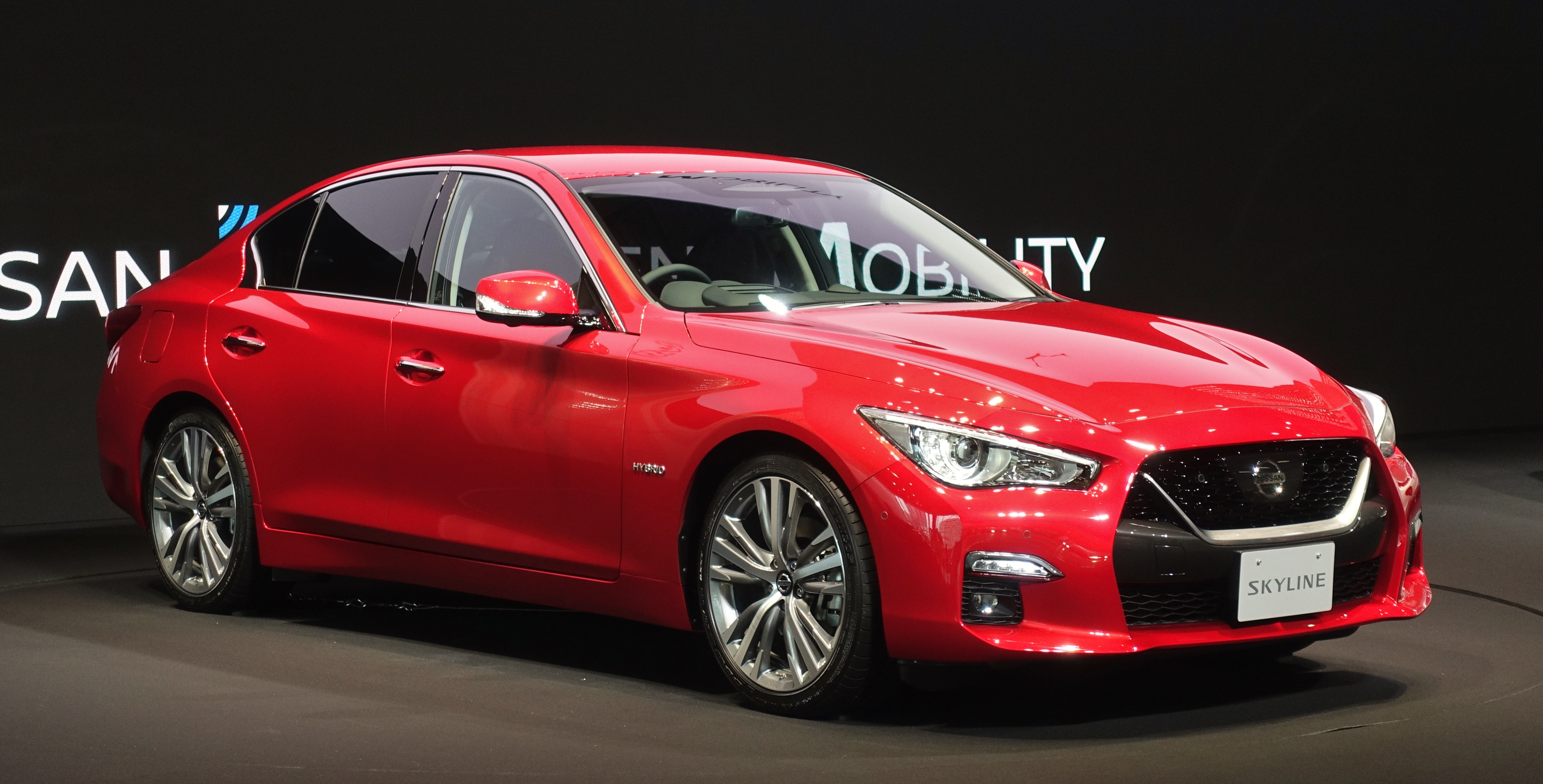 2019 Nissan Skyline